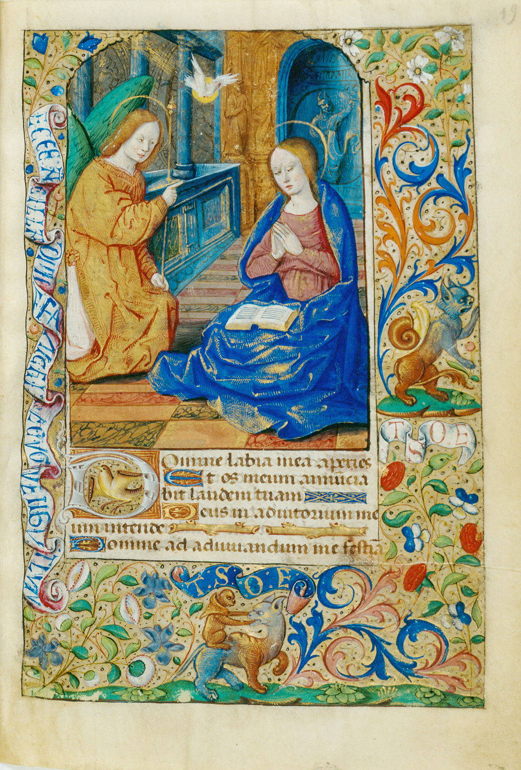 Stundenbuch Christophs I., um 1500: Verkündigung an Maria Manuscript in the Badische Landesbibliothek, Karlsruhe Codex Durlach 1, Bl. 19r